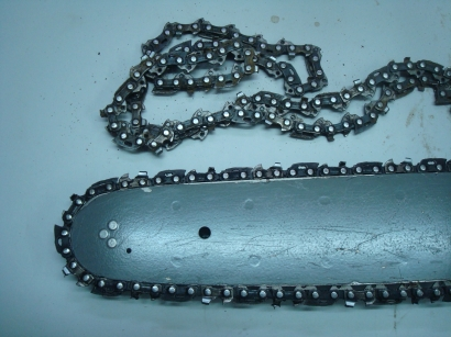 Mortaisage à la chaîne.